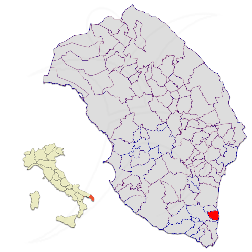 Il territorio del comune di Corsano nella provincia di Lecce